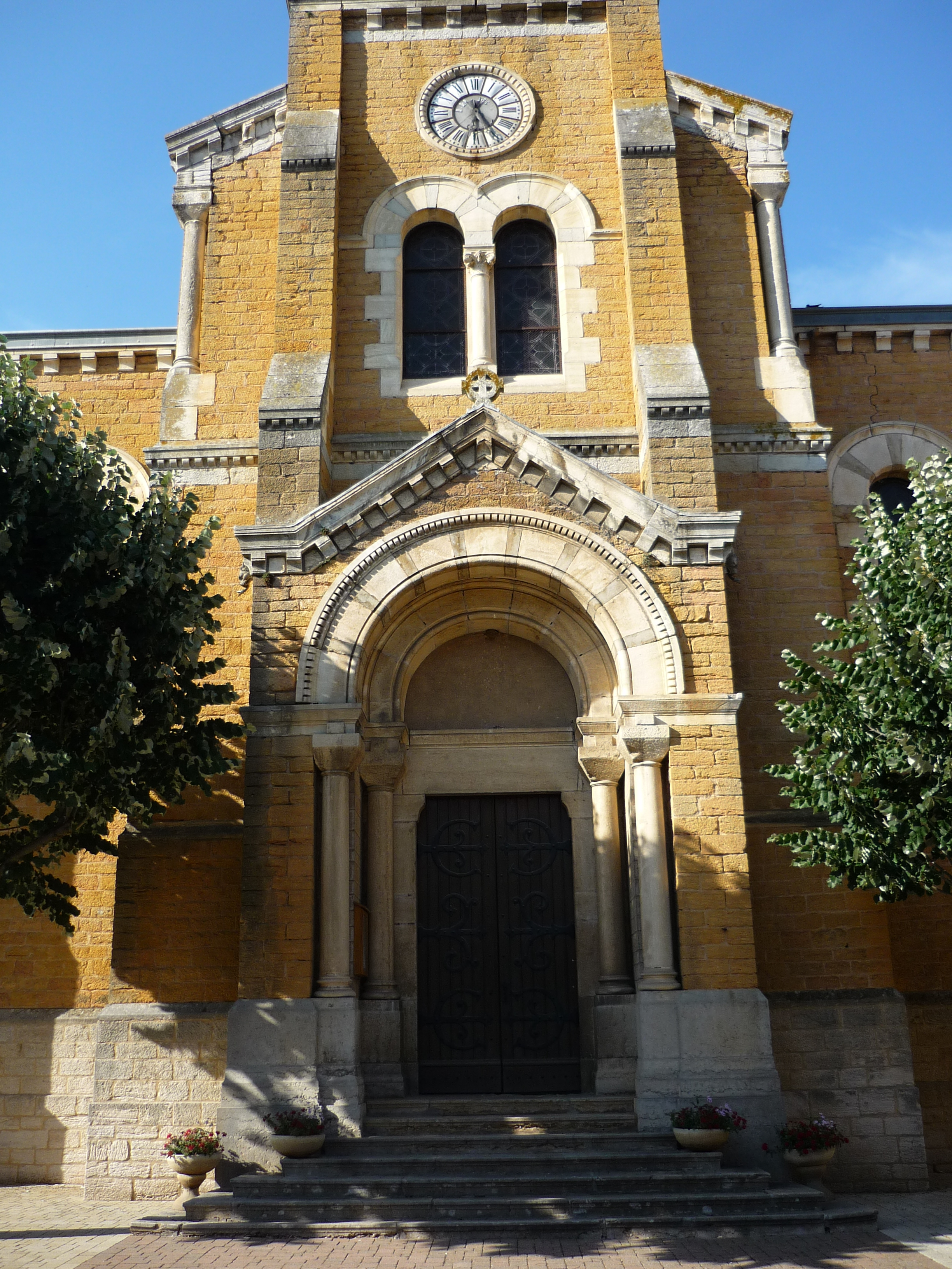 Vue sur la partie basse de l'entrée de l'Église de Rivolet, dans le département du Rhône